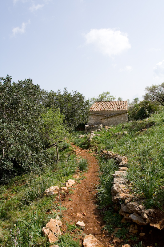 Riserva naturale dello Zingaro Contrada Sughero